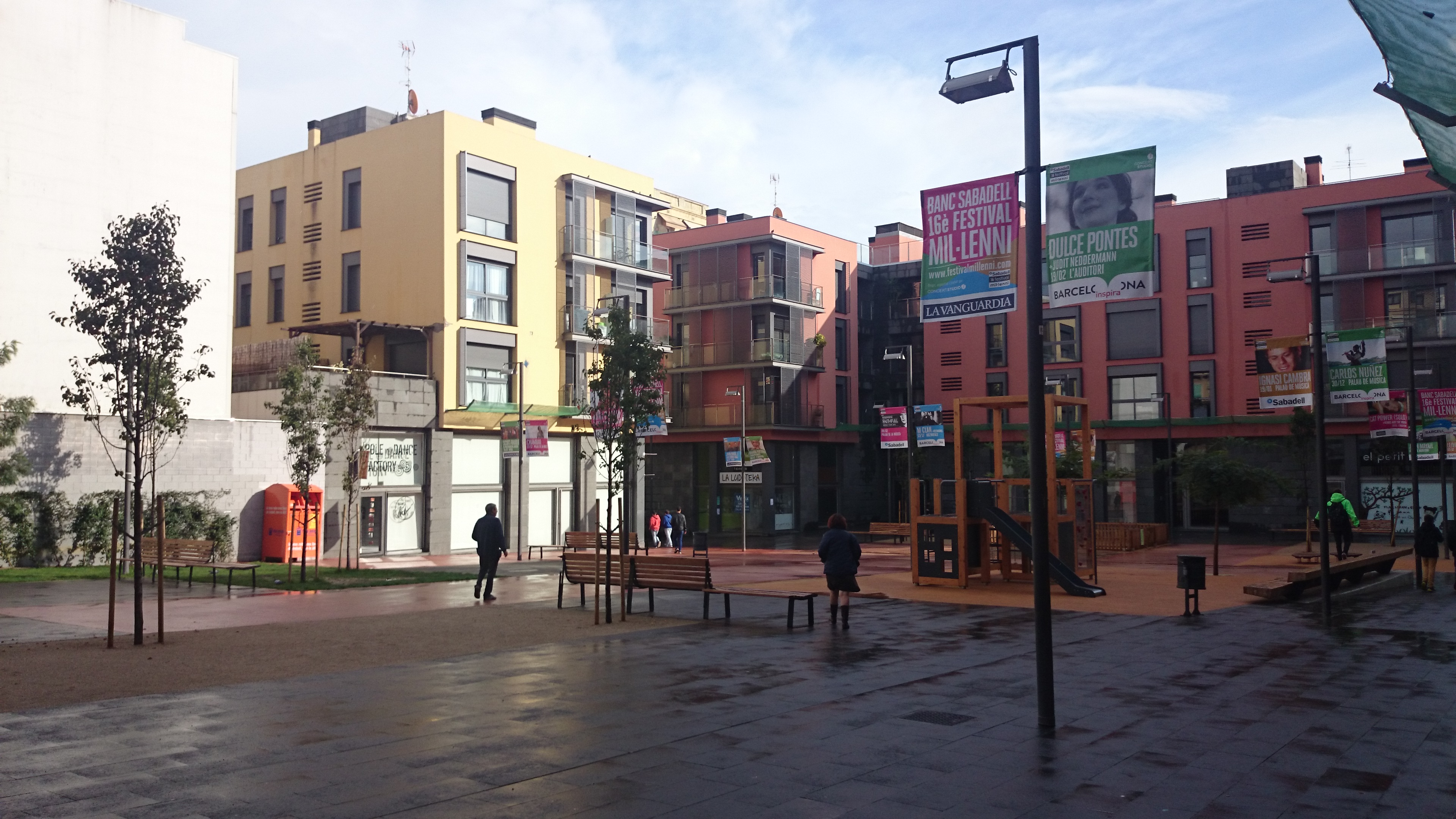 Panoràmica de la plaça de les Dones del 36 des de l'entrada del carrer de Santa Àgata.